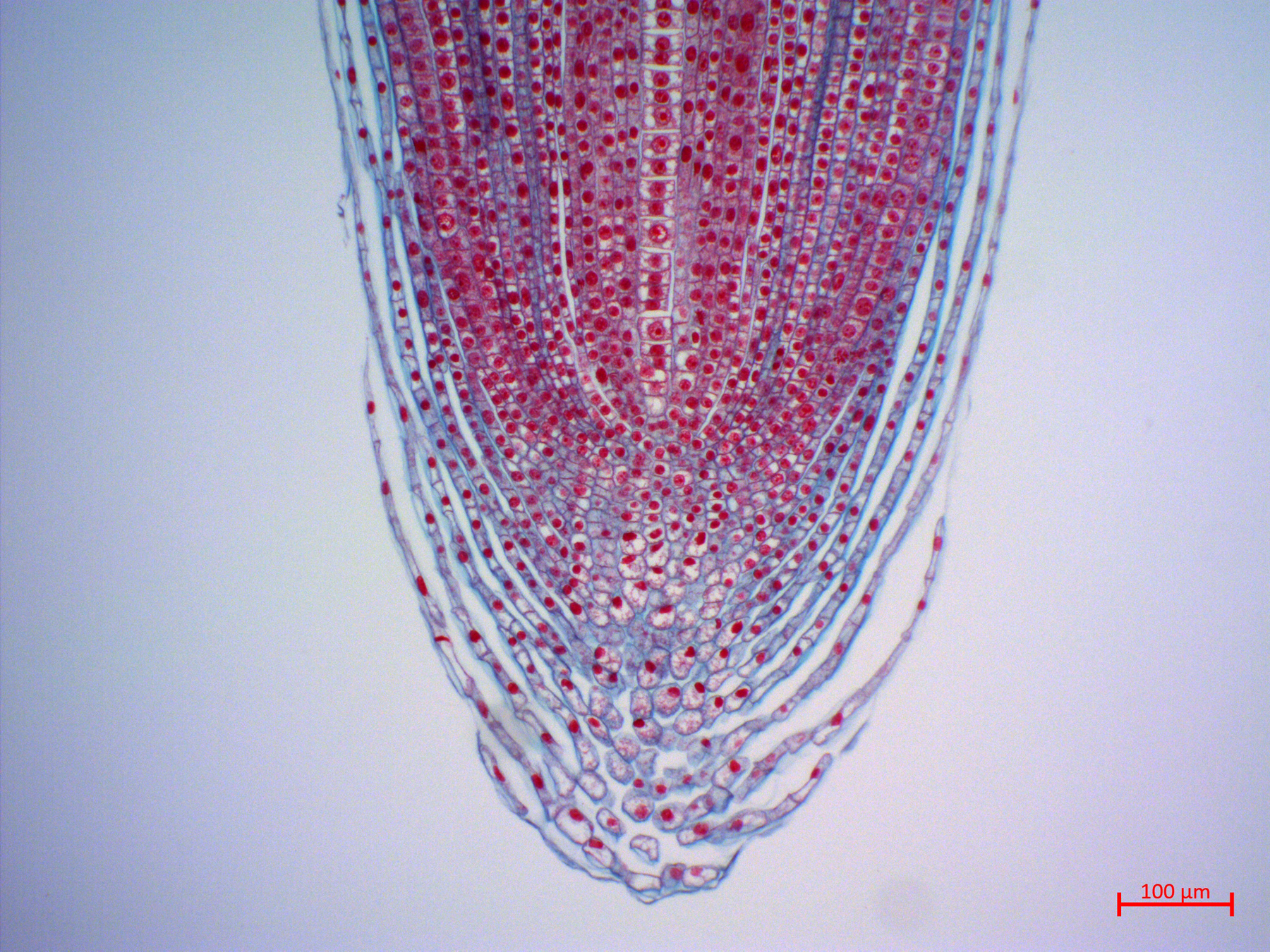 AlliumRAM_10x